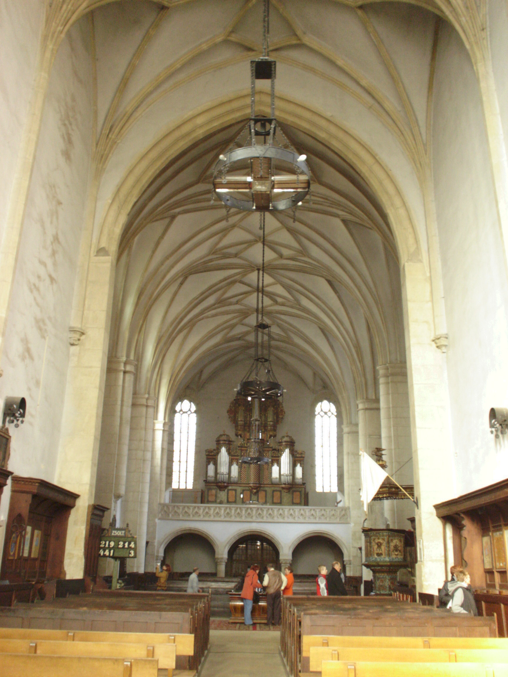 Cluj-Napoca, Biserica Reformată-Calvină (str. M.Kogălniceanu nr.21)